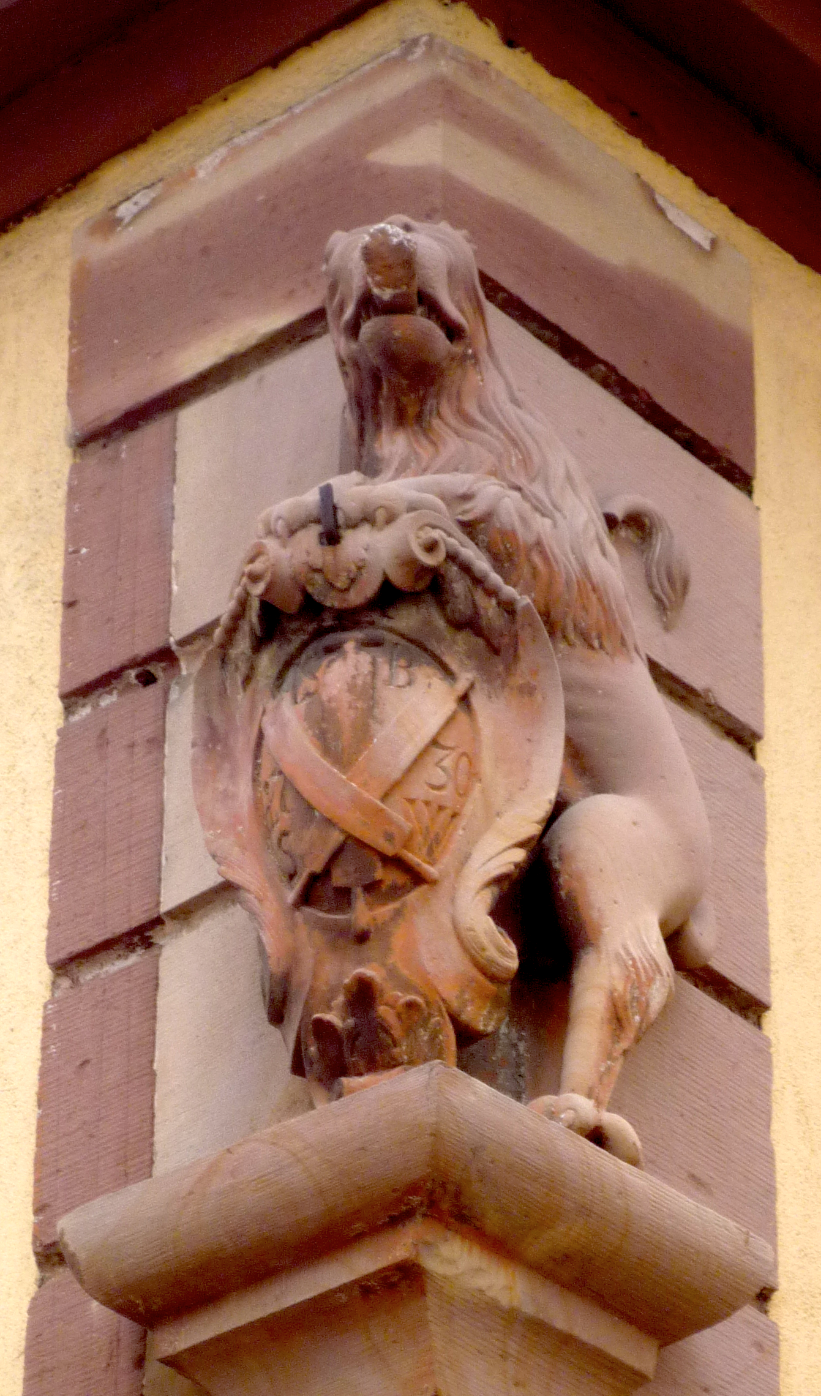 Wasselonne Enseigne de tanneur 1730